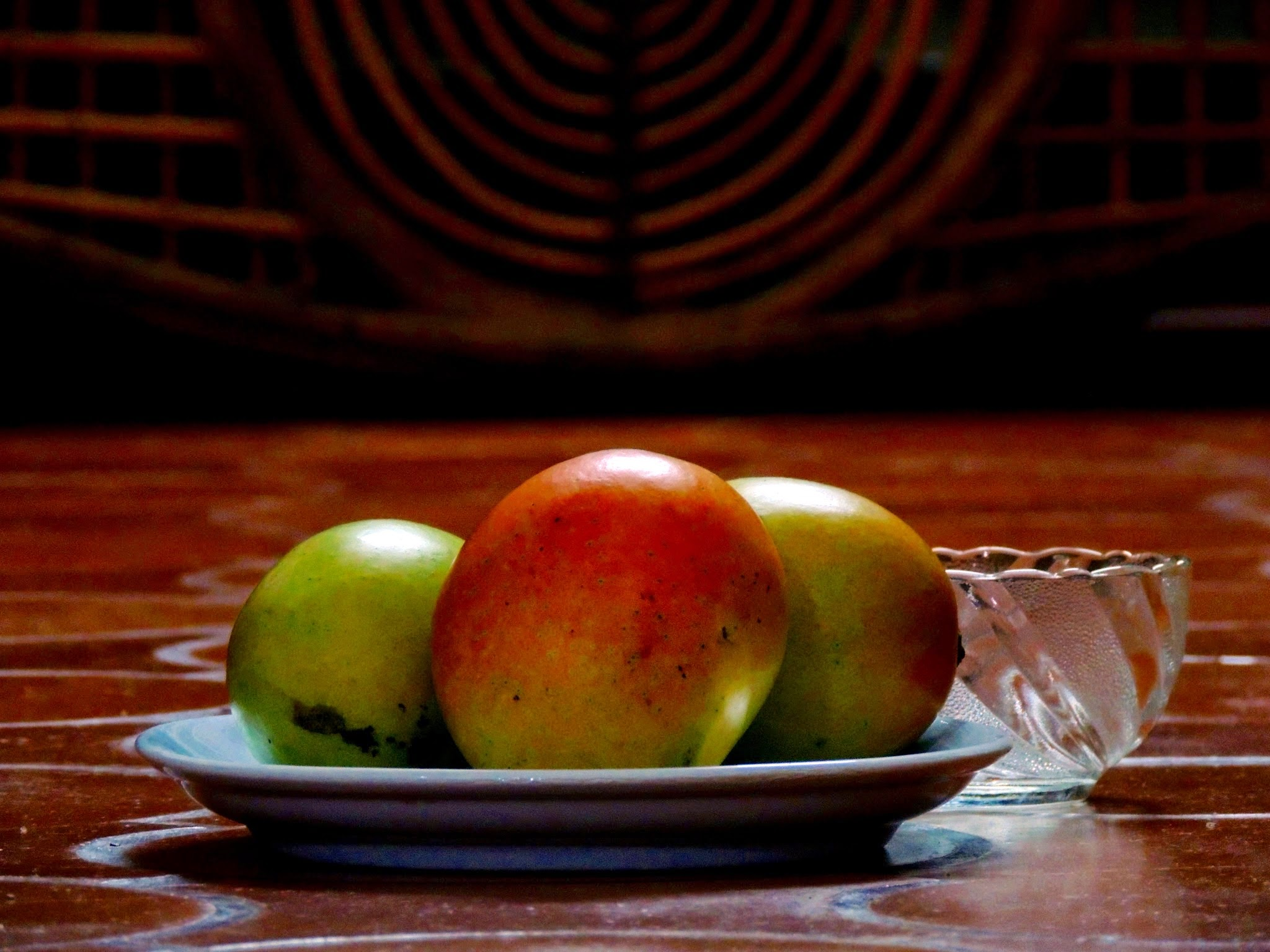 ഒളോര്‍ മാമ്പഴം, കോഴിക്കോട്